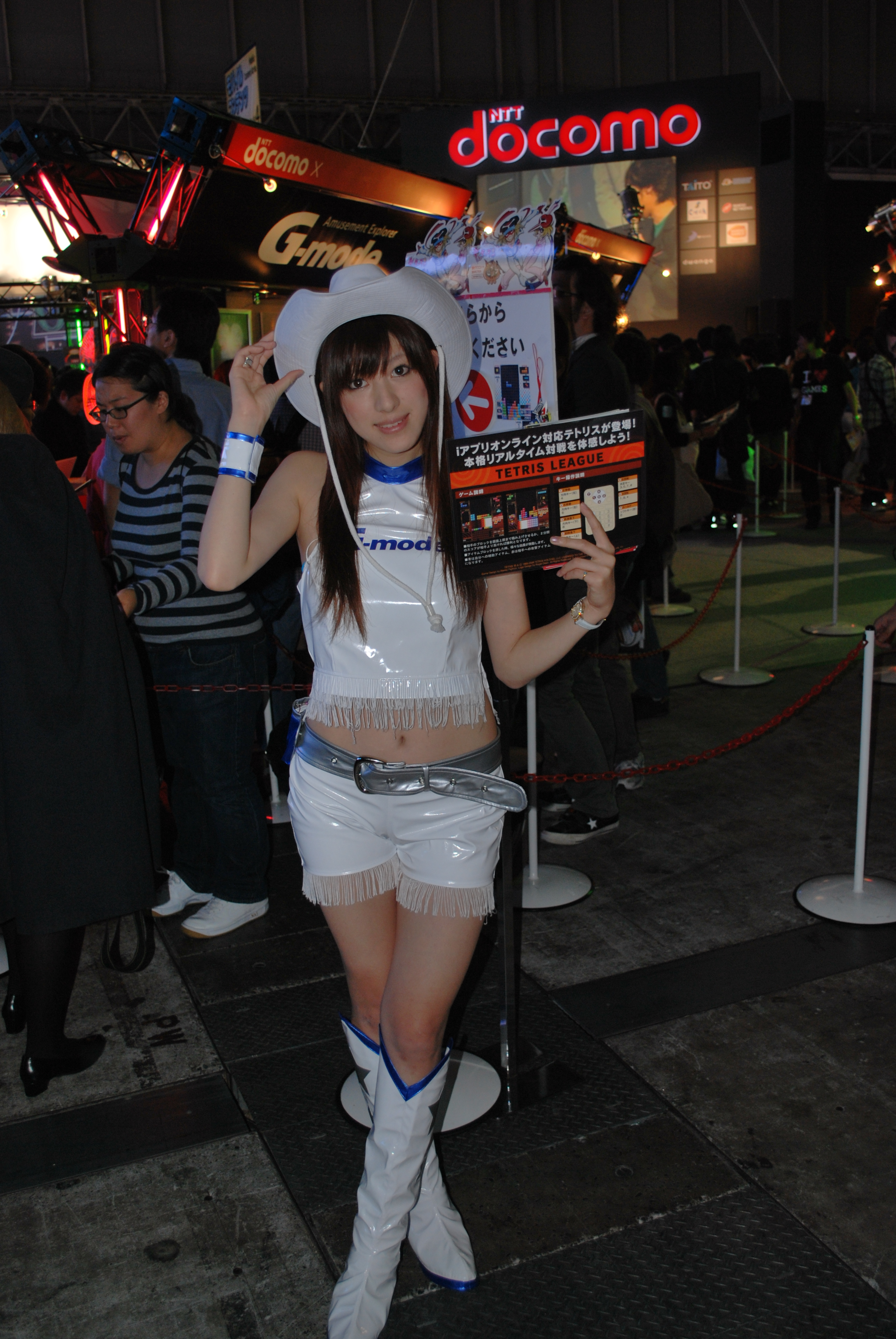 2008東京電玩展，G-Mode攤位的宣傳模特兒。